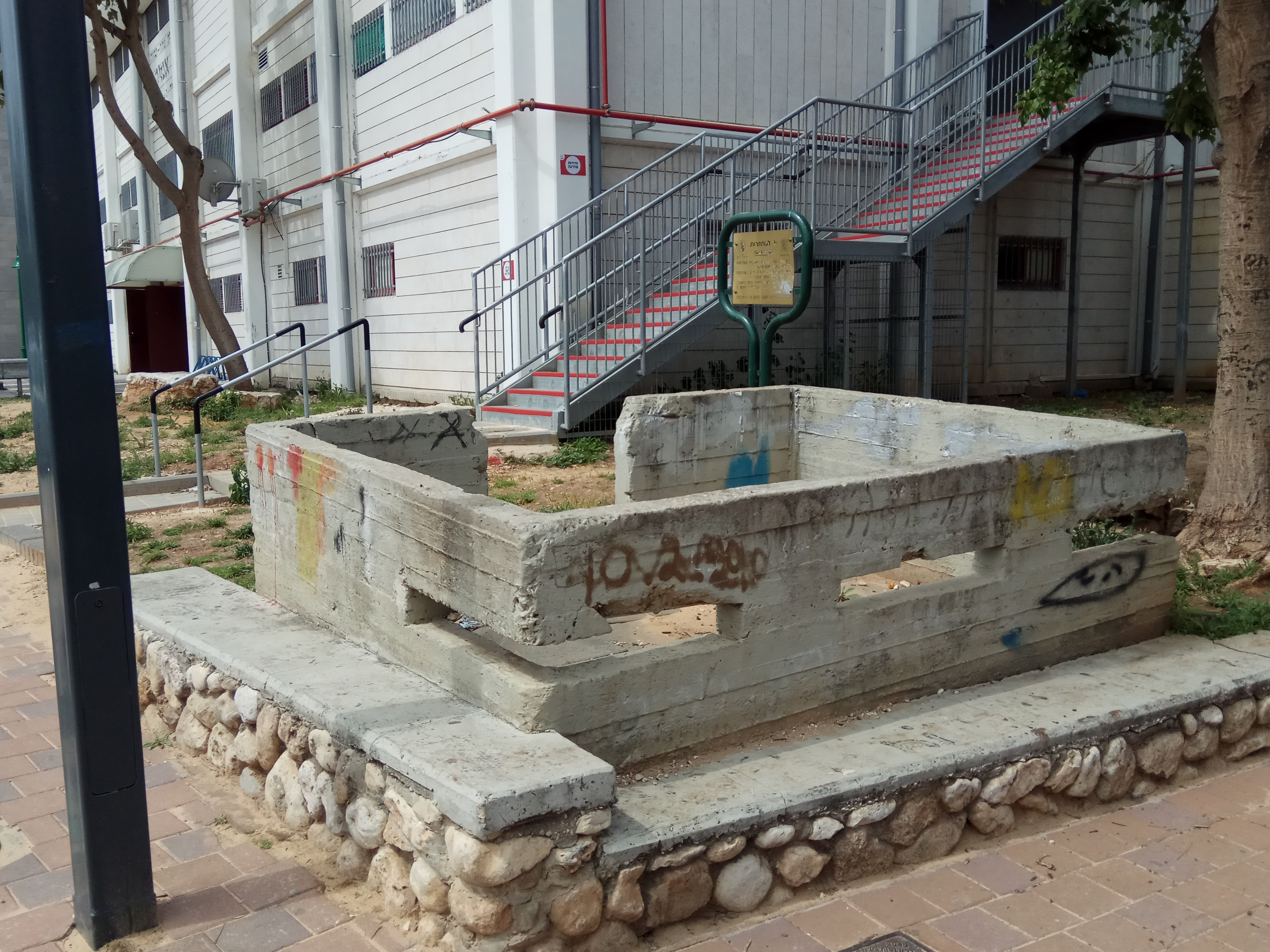 עמדת ההגנה בקצה רחוב פוחס בעין גנים, נבנתה ב-1938